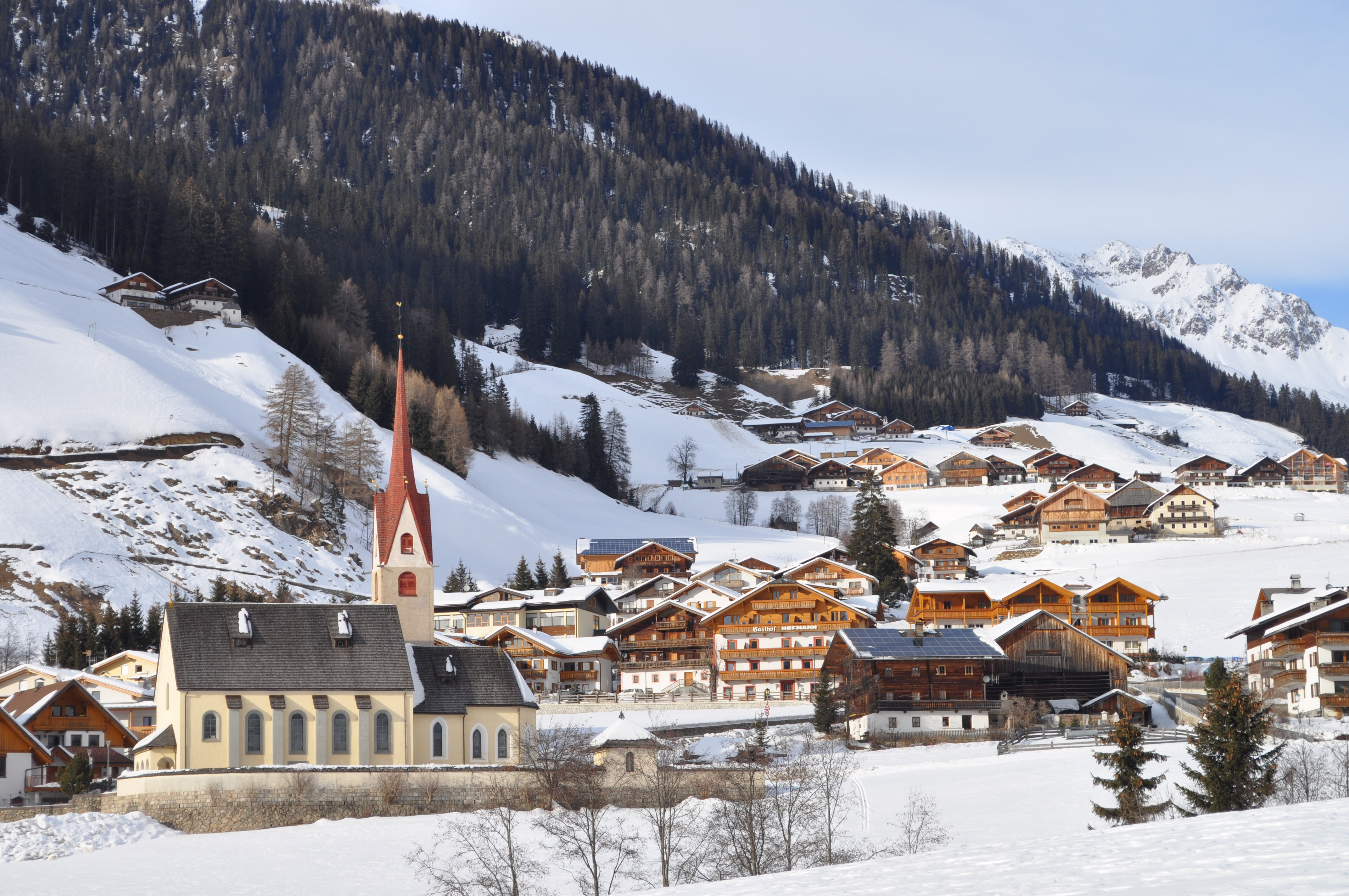 Ortsteil St. Magdalena in Gsies